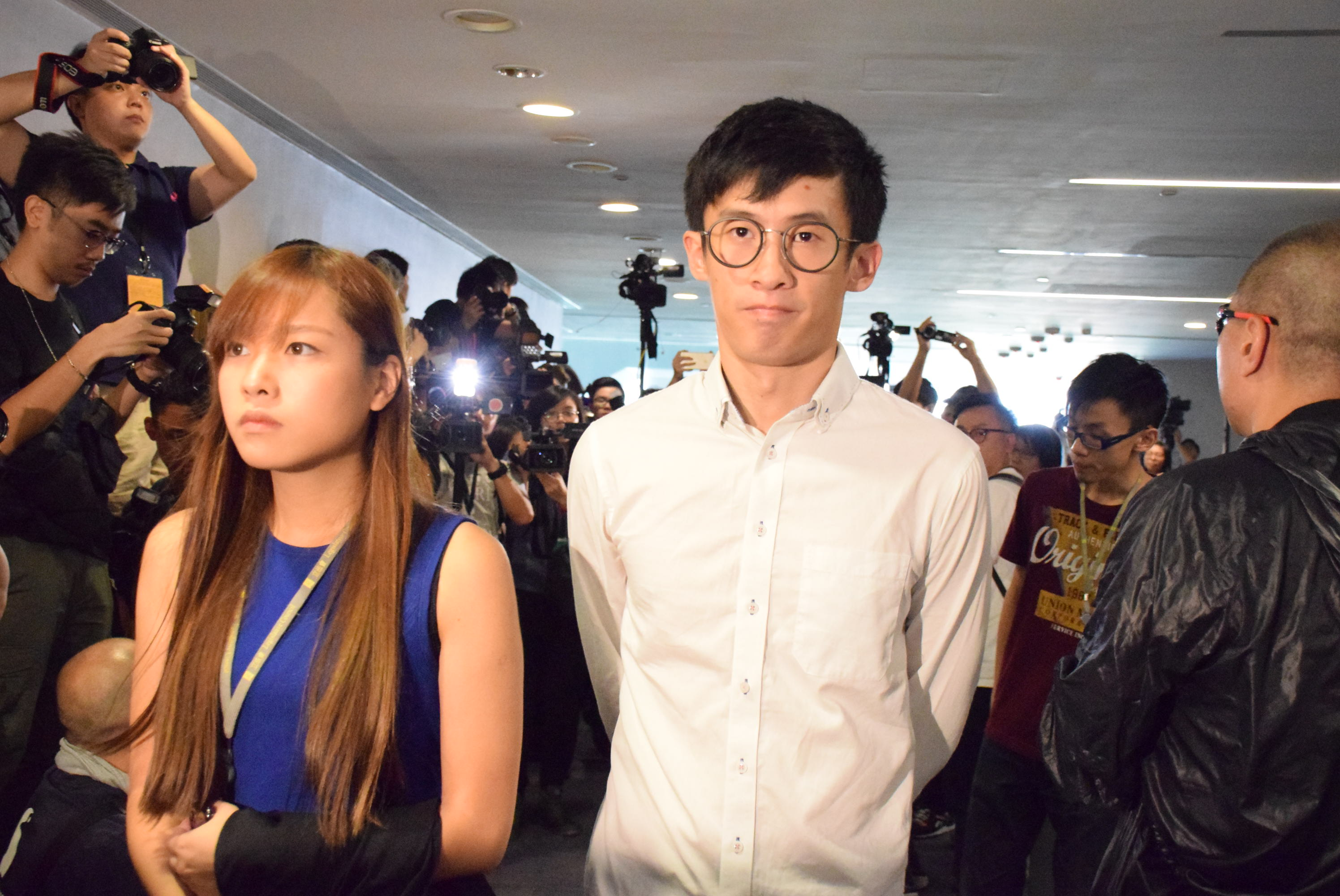 香港立法會議員游蕙禎及梁頌恆。(美國之音湯惠芸)